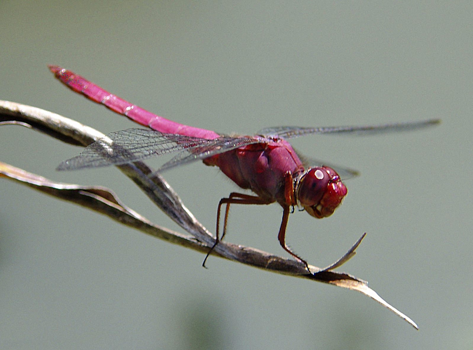 Libélula - dragonfly - libelinha - lava-bunda